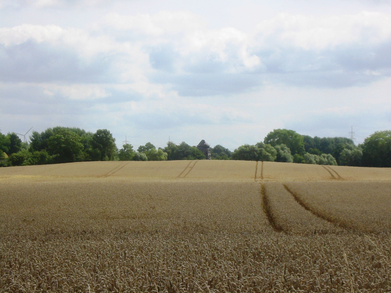 Denkmalgeschützte Windmühle in Klein Ernsthof, aufgenommen vom Mühlenberg, einer 24 Meter hohen Erhebung zwischen Klein Ernsthof und Stilow in der Gemeinde Brünzow, Landkreis Vorpommern-Greifswald.